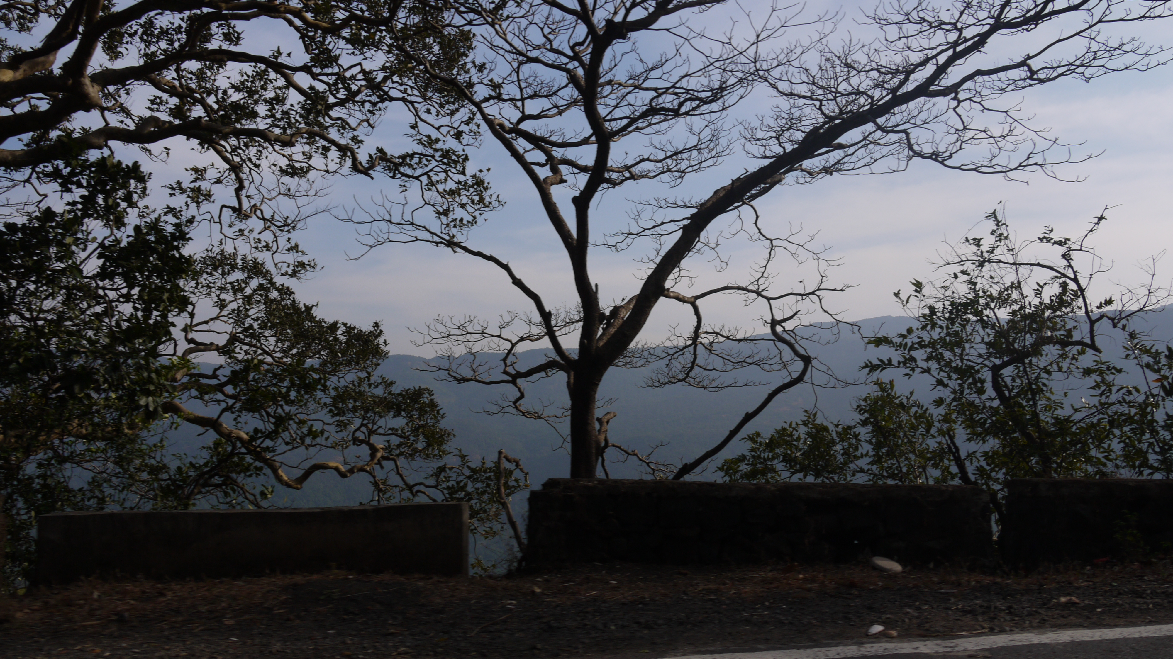 ... Amboli Ghat